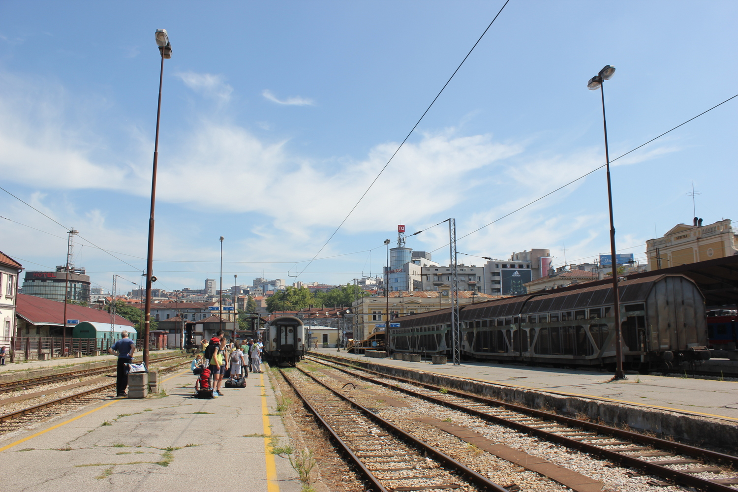 Bahnsteig auf dem Hauptbahnhof Belgrad, Serbien.